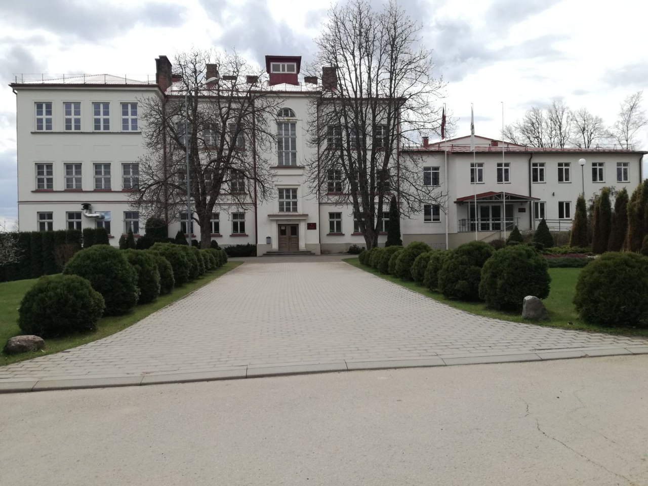 Ezernieku vidusskola